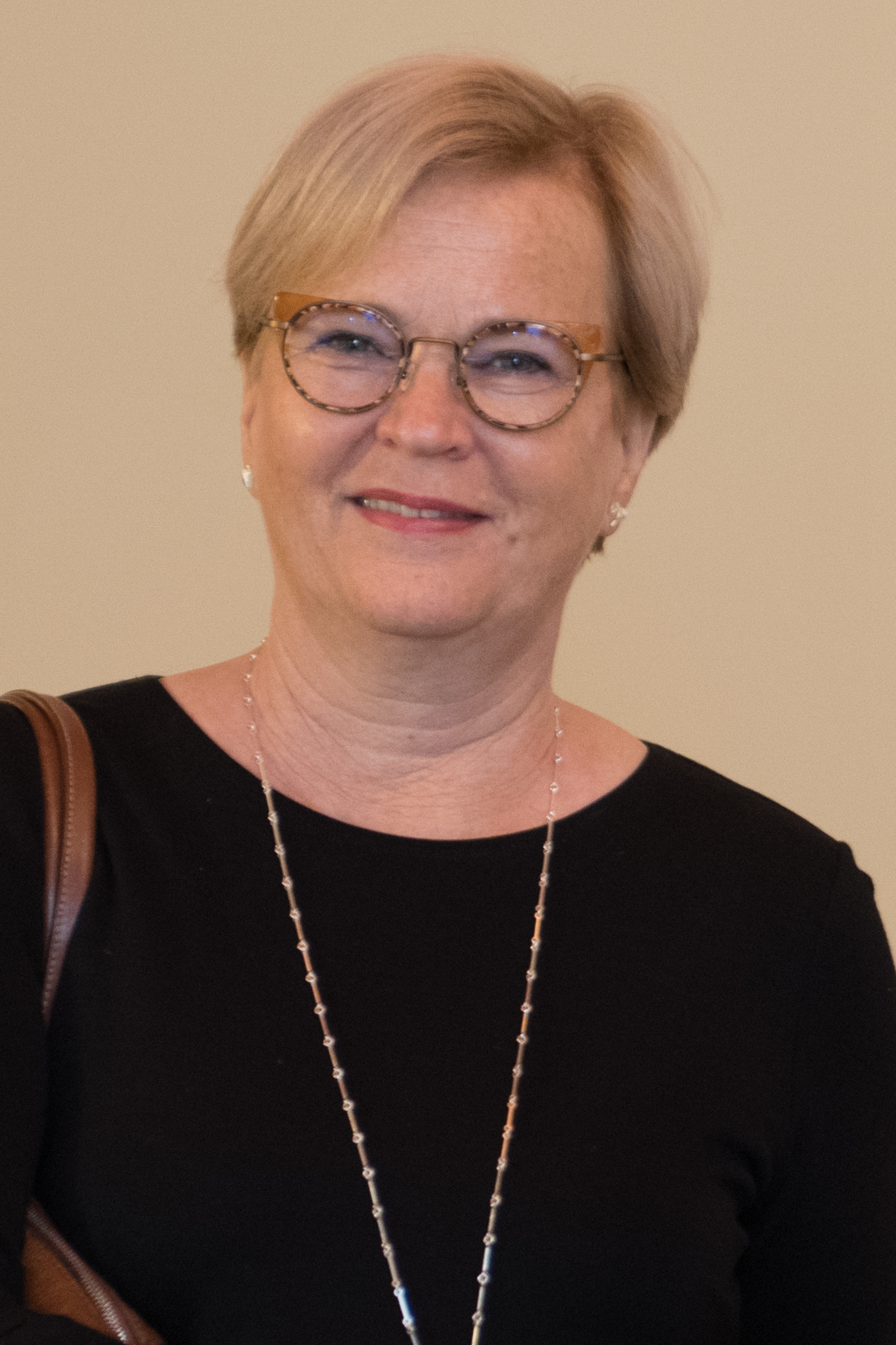 2018.gada 4.septembris. Saeimas priekšsēdētāja Ināra Mūrniece tiekas ar Somijas Republikas ārkārtējo un pilnvaroto vēstnieci Latvijas Republikā Marju Rītu Korpivāru (Marja Riitta Korpivaara). Foto: Ieva Ābele, Saeima Izmantošanas noteikumi: saeima.lv/lv/autortiesibas